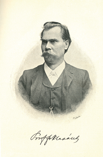 František Klapálek (1863 - 1919), Český entomolog.